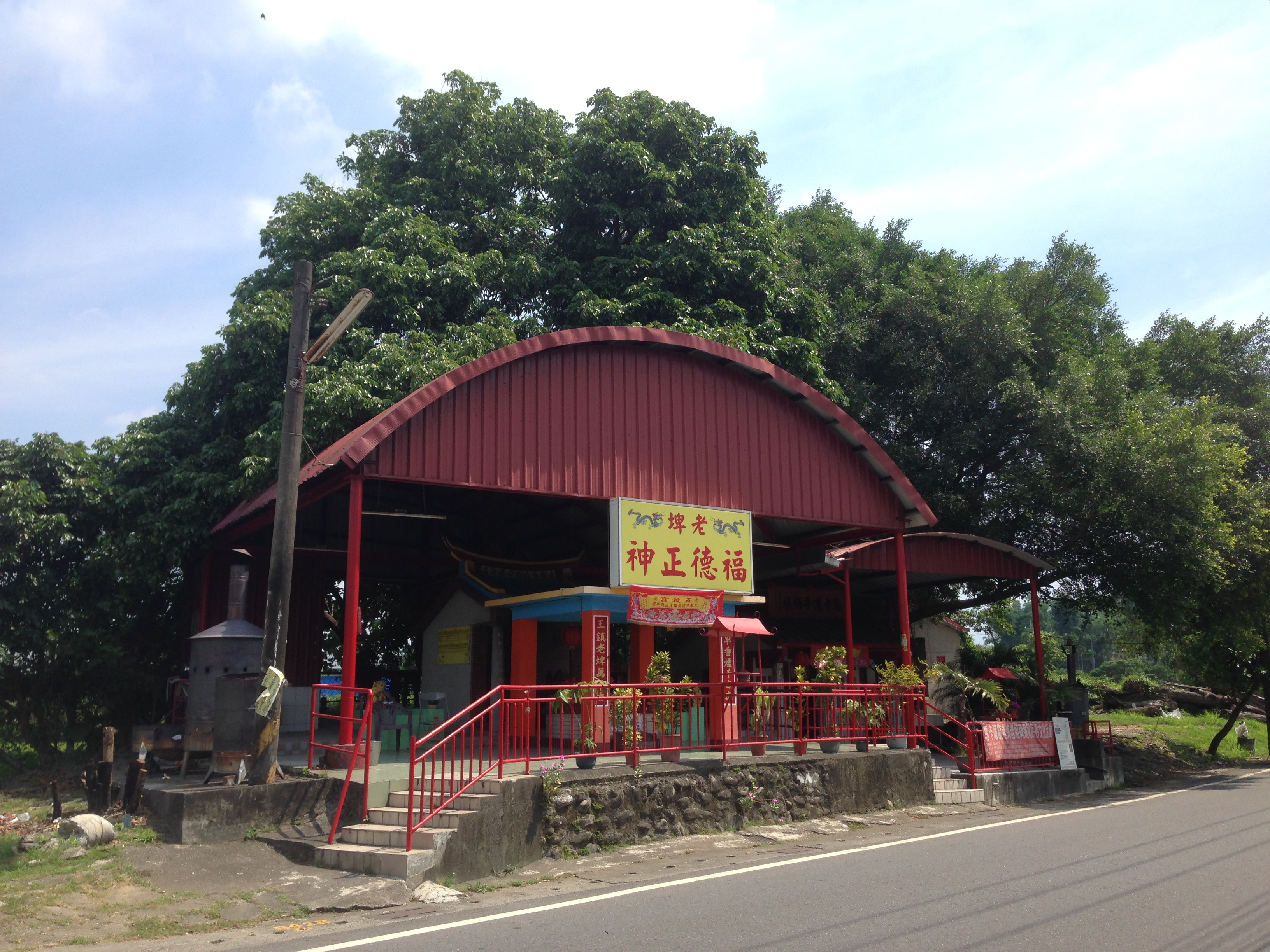 老埤福德正神祠與老祖祠、伯公祠